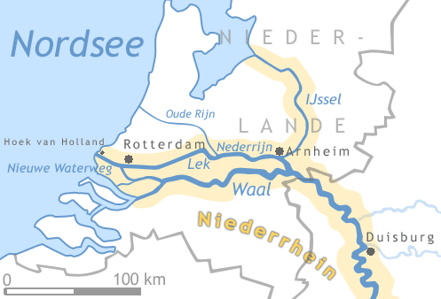 Kaart van diverse rivieren in Nederland